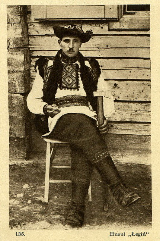 Гуцульський легінь